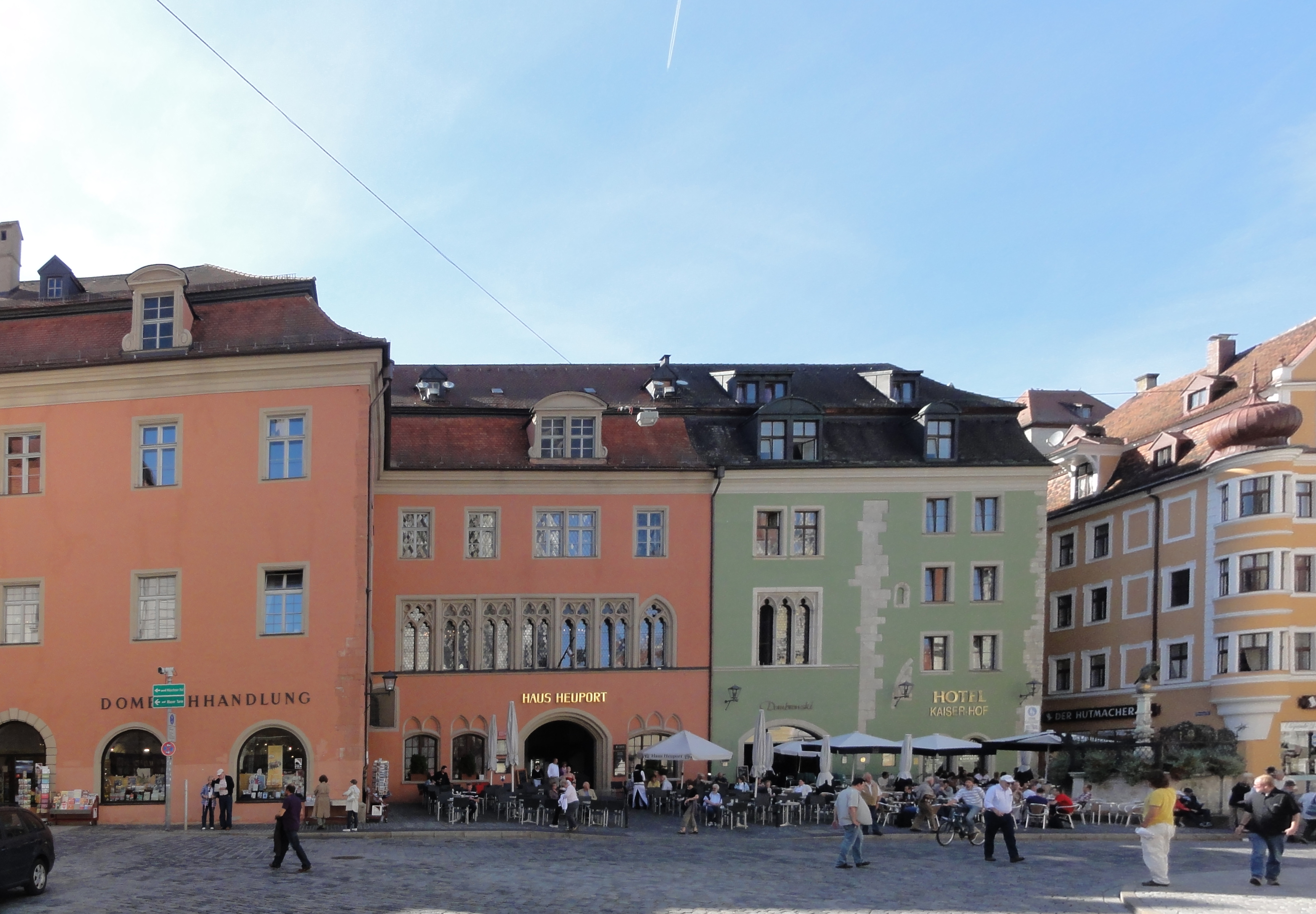 Regensburg - Domplatz